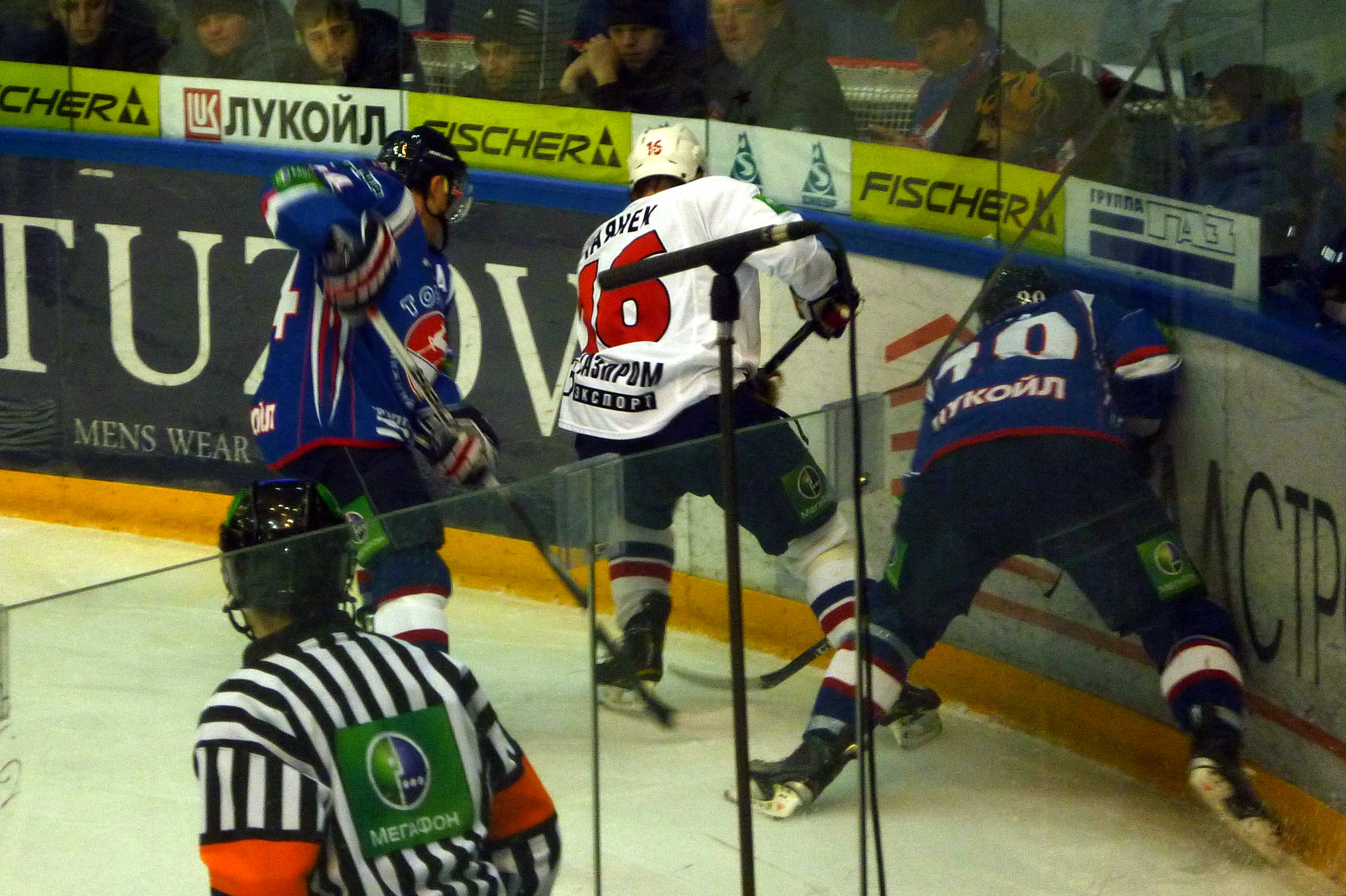 Нападающий питерского СКА Петр Чаянек ведёт борьбу с двумя защитниками нижегородского «Торпедо» в матче 12 декабря 2010 года